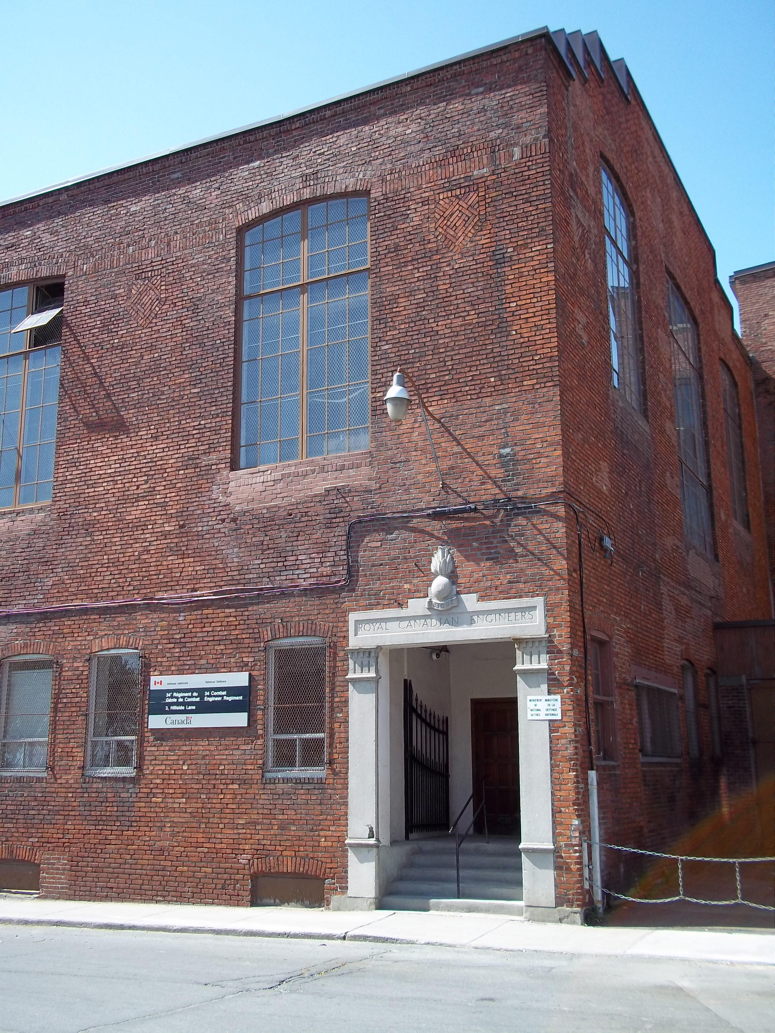 Manège du 34e Régiment du génie de combat, 3 avenue Hillside, Westmount